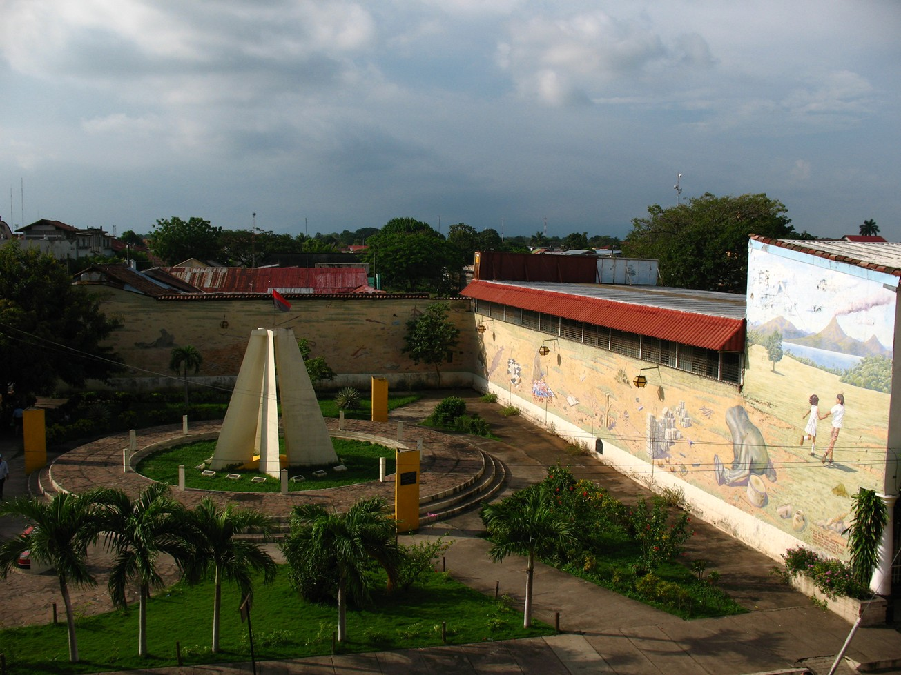 Mausoleo de los heroes y mártires en León